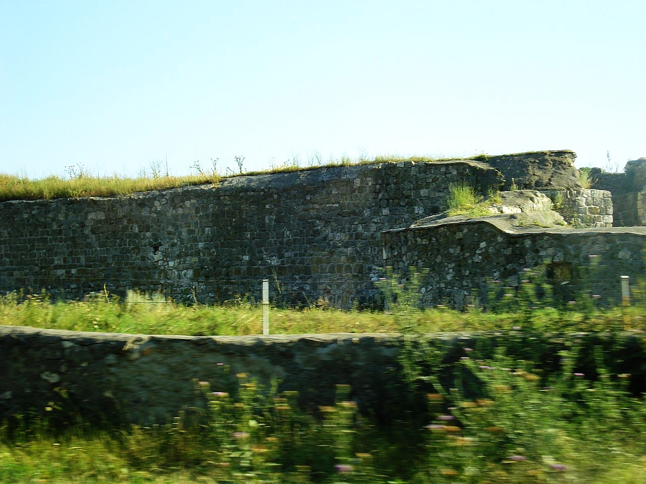 Zidurile Cetatii Capidava 03